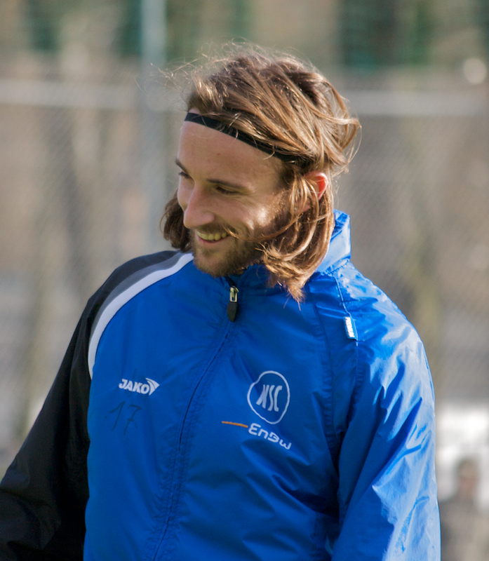 Joshua Blake Kennedy